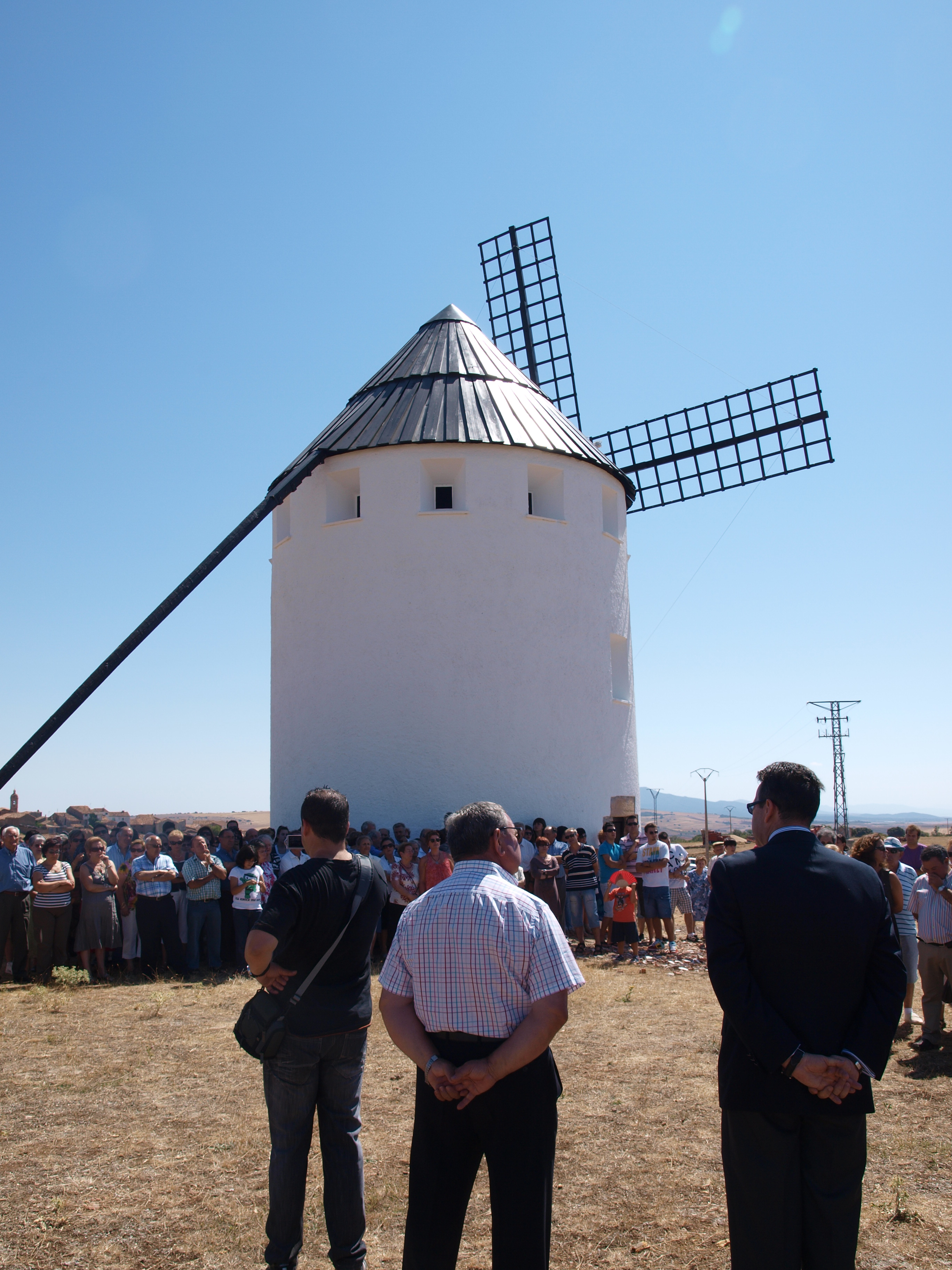 Inauguración del molino de viento de Malanquilla, 21 de agosto de 2010